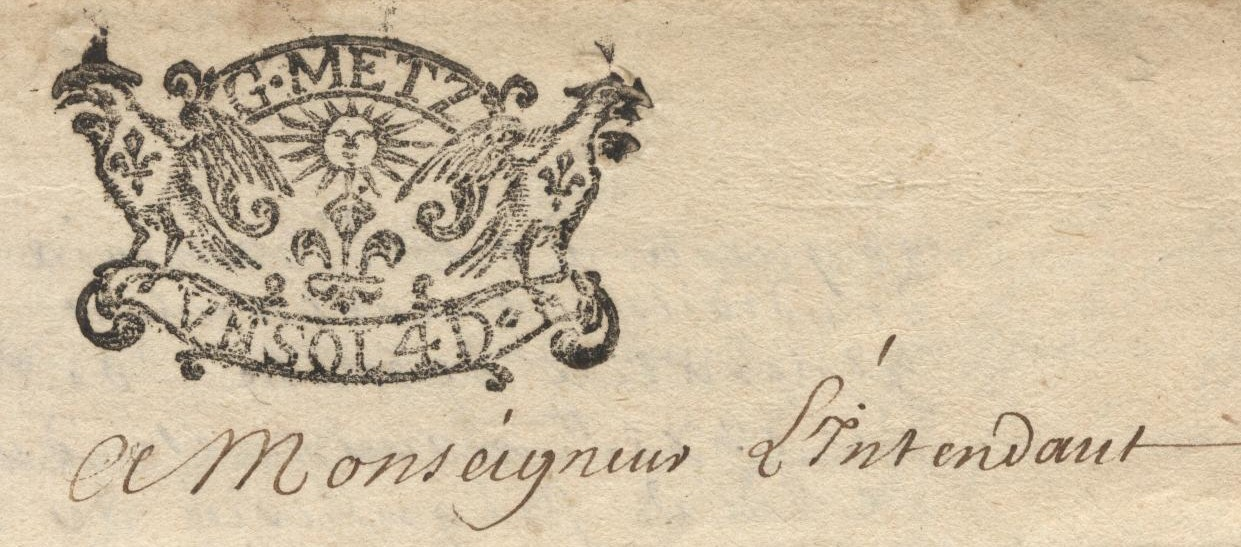 Timbre fiscal sur un acte notarié de Carignan (Ardennes) du gouvernement de Metz d'1_sol_et 4_deniers, de l'année 1733. Archives personnelles